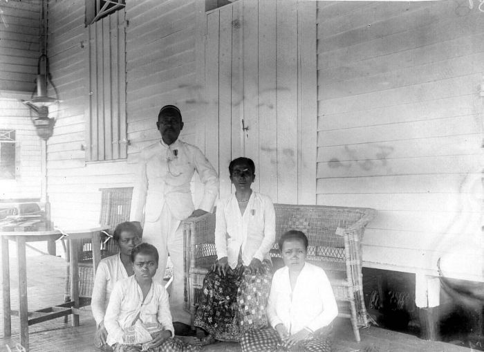 Negatief. Deze foto is gemaakt tijdens de Midden-Celebes Expeditie van 1909-1910.. De makole van Matana Andi Haloe en het hoofd van Malili (Midden-Celebes), beide met een Zilveren Ster van Verdienste